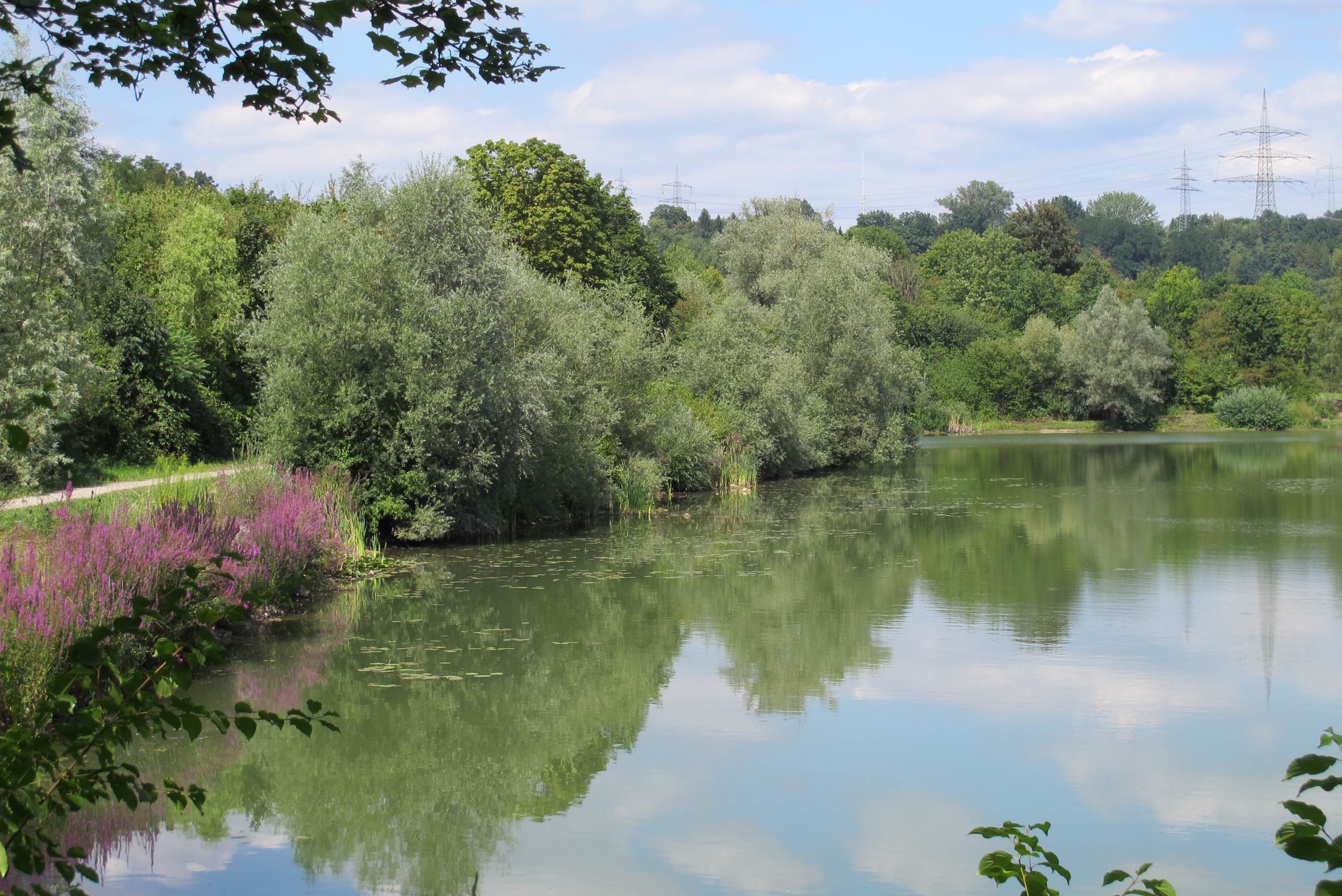 Naherholungsgebiet